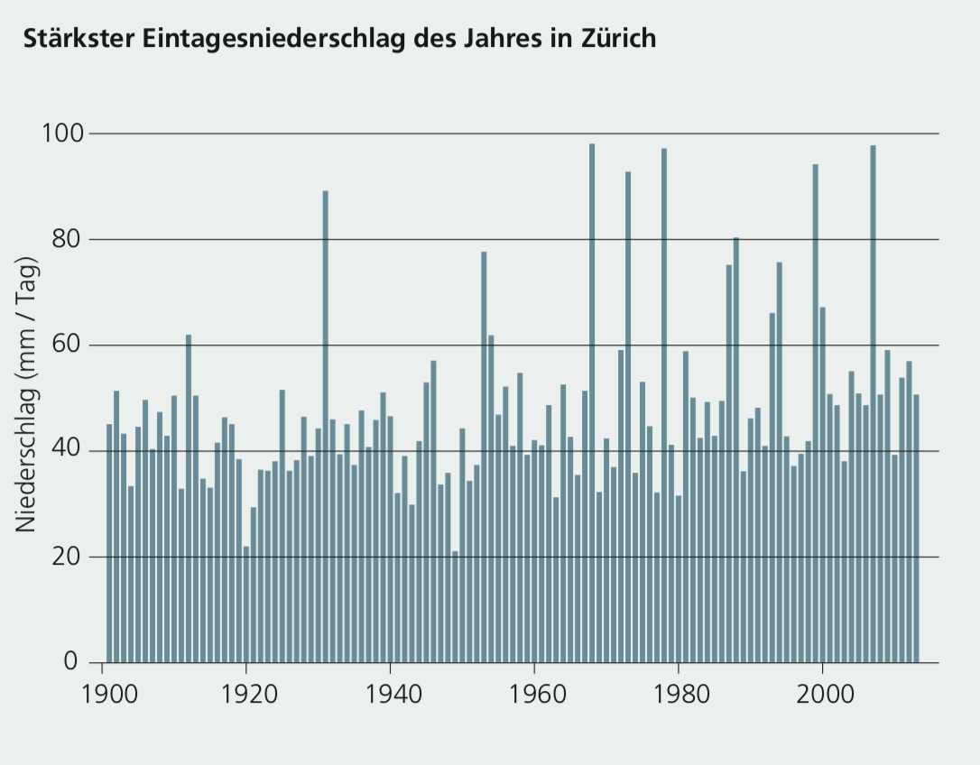 Klima in der Schweiz. Eintagsniederschlag Zürich. NCCS (Hrsg.) 2018: CH2018 – Klimaszenarien für die Schweiz. National Centre for Climate Services, Zürich.